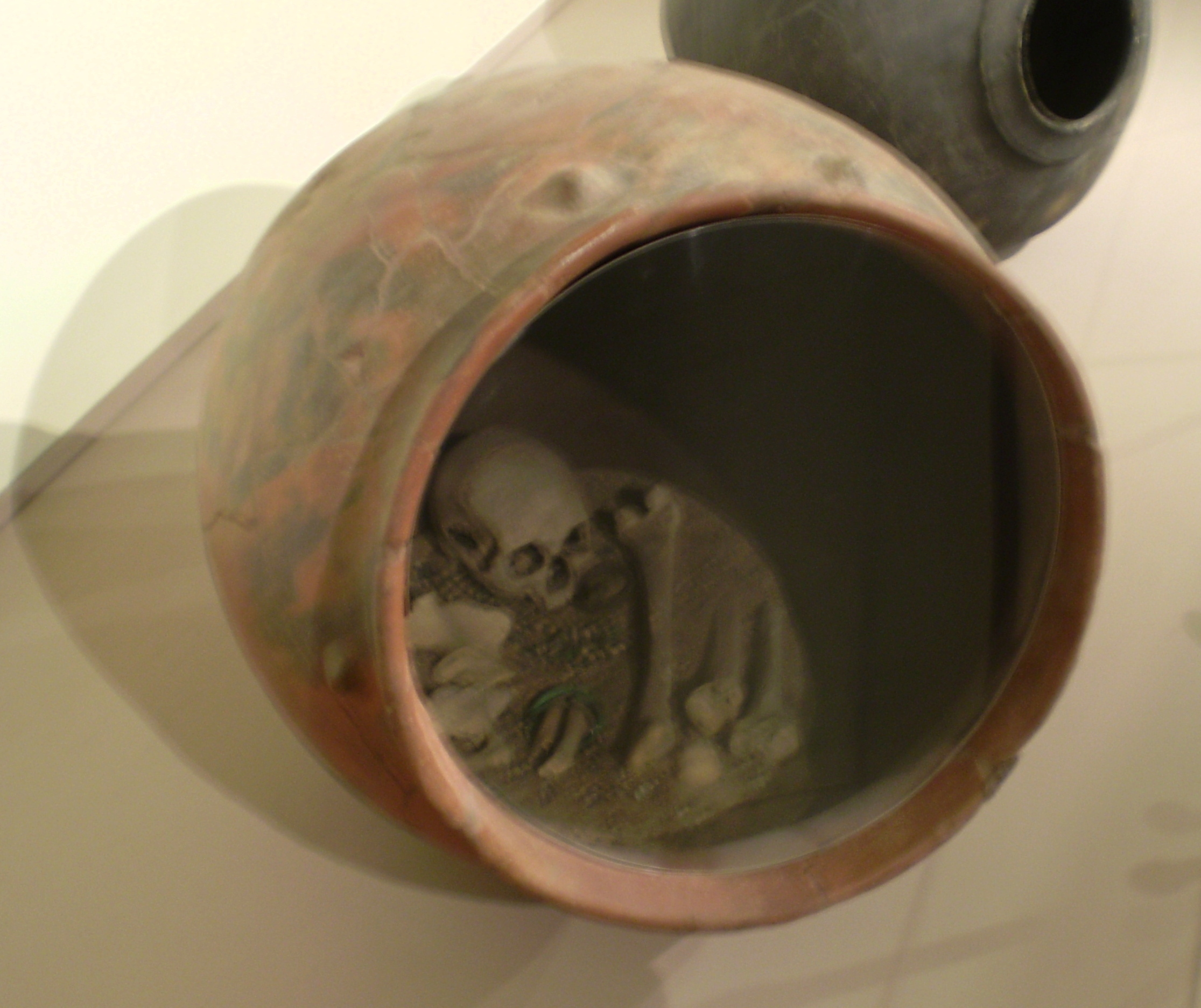 site archéologique de El Argar (Espagne): Cercueil urne funéraire de la tombe n°9 - 2300 - 1600 av. J.C. (découvert par Louis Siret 1880-1886)